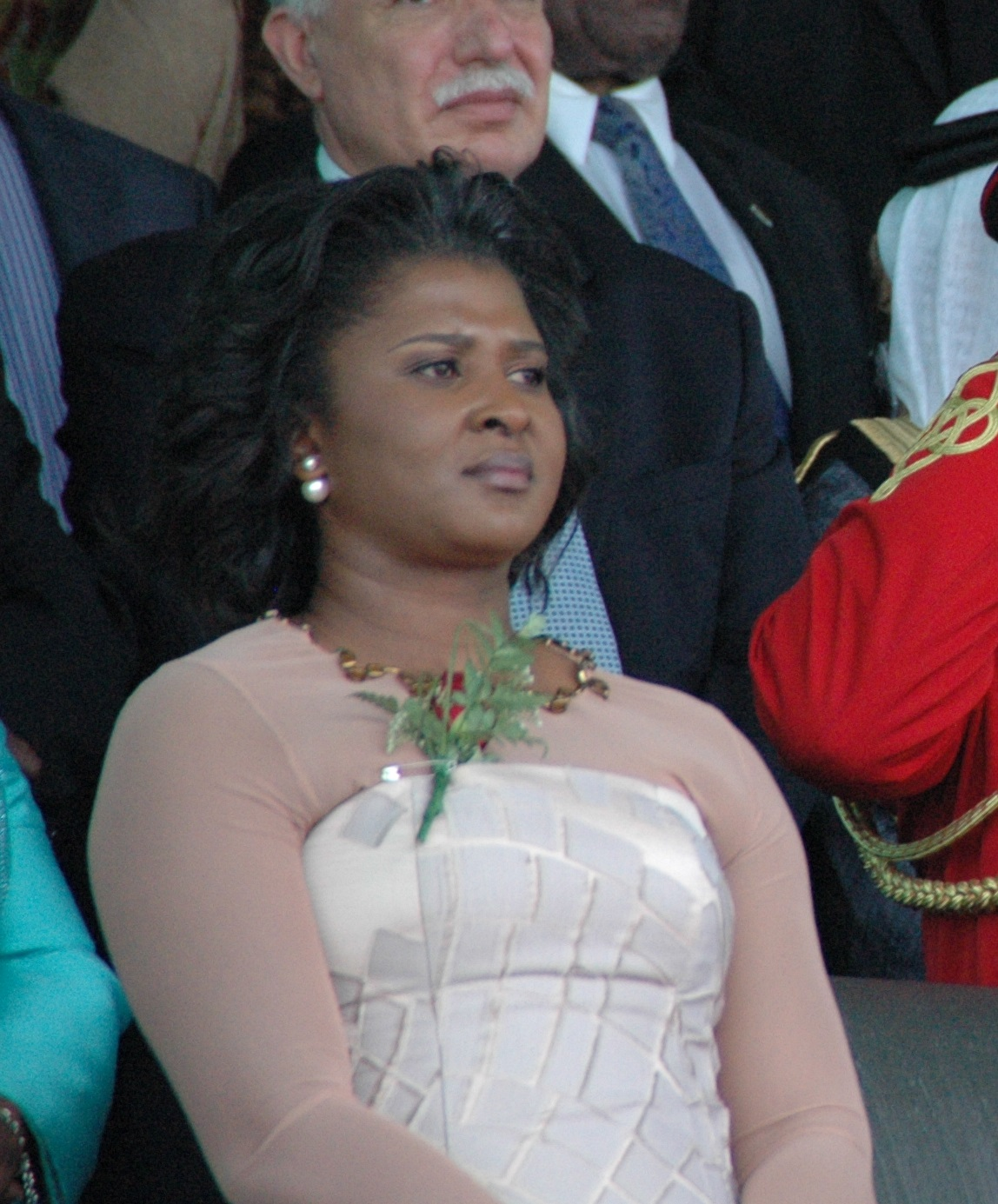 Monica Geingos bei der Vereidigung von Präsident Hage Geingob